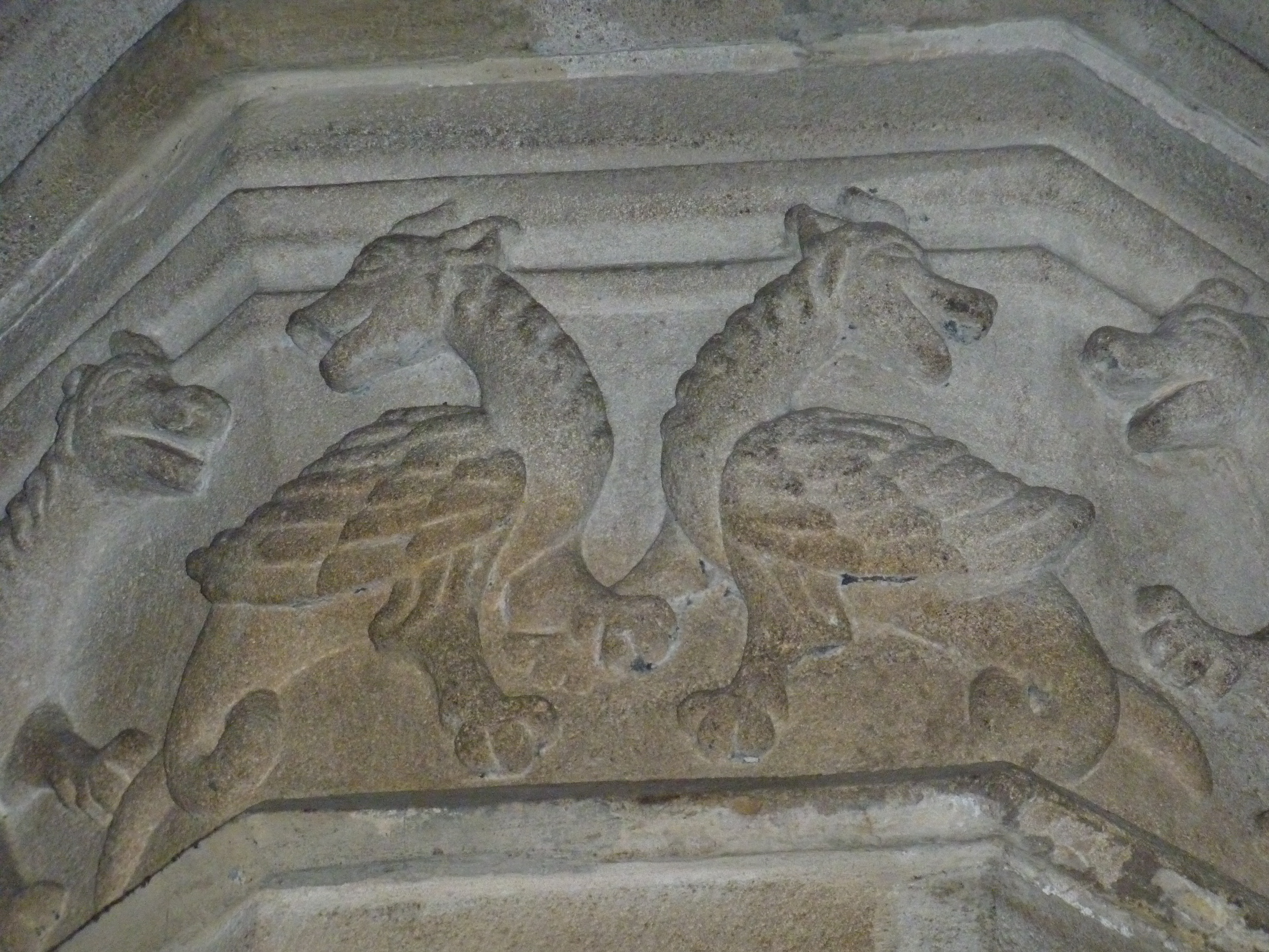 Detail eines Pfeilerschmucks der ev. Stadtkirche St. Dionys in Esslingen